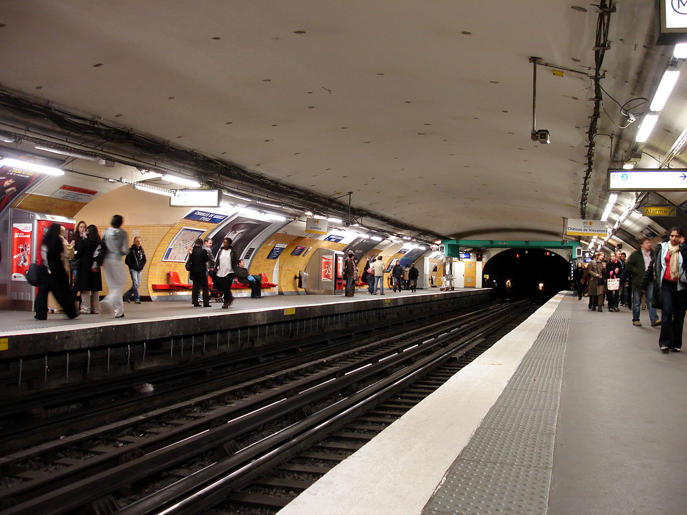 La station Charles-de-Gaulle - Étoile de la ligne 1 du métro de Paris, France